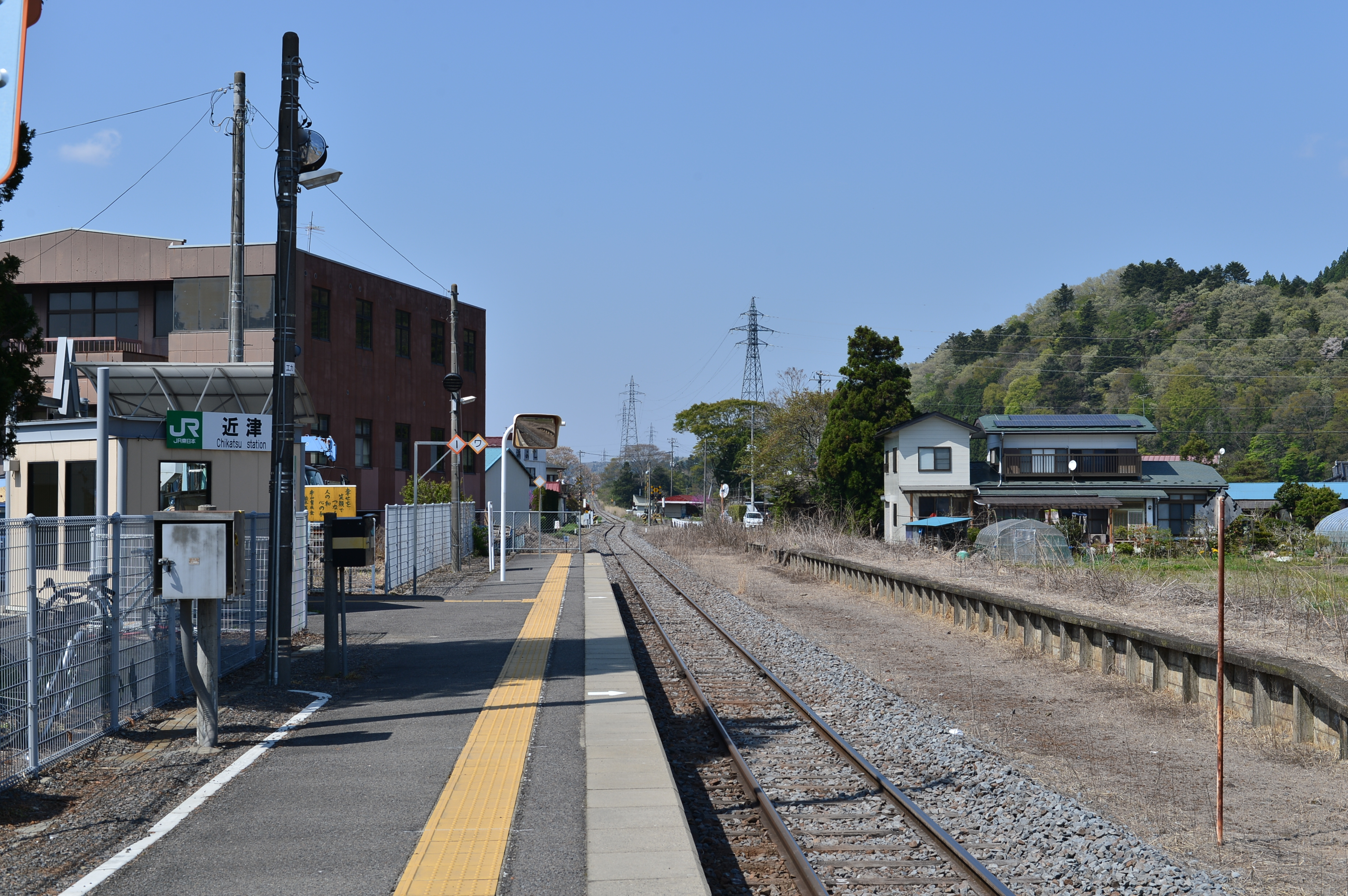 近津駅のホーム（JR水郡線）